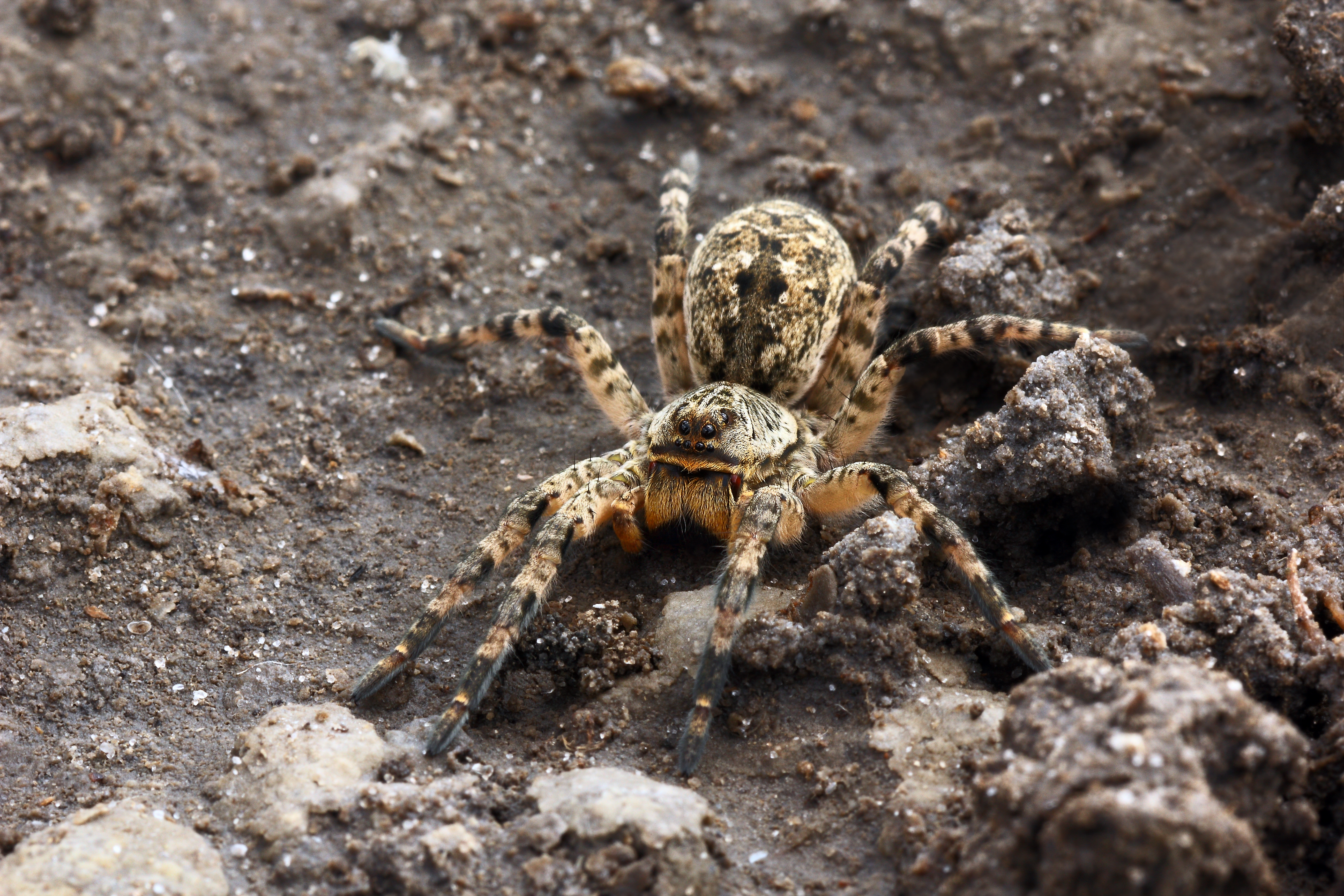 Місце зйомки: орнітологічний заказник Булахівський Лиман. Об'єкт зйомки: Тарантул південноруський - Lycosa singoriensis (Laxmann, 1770)